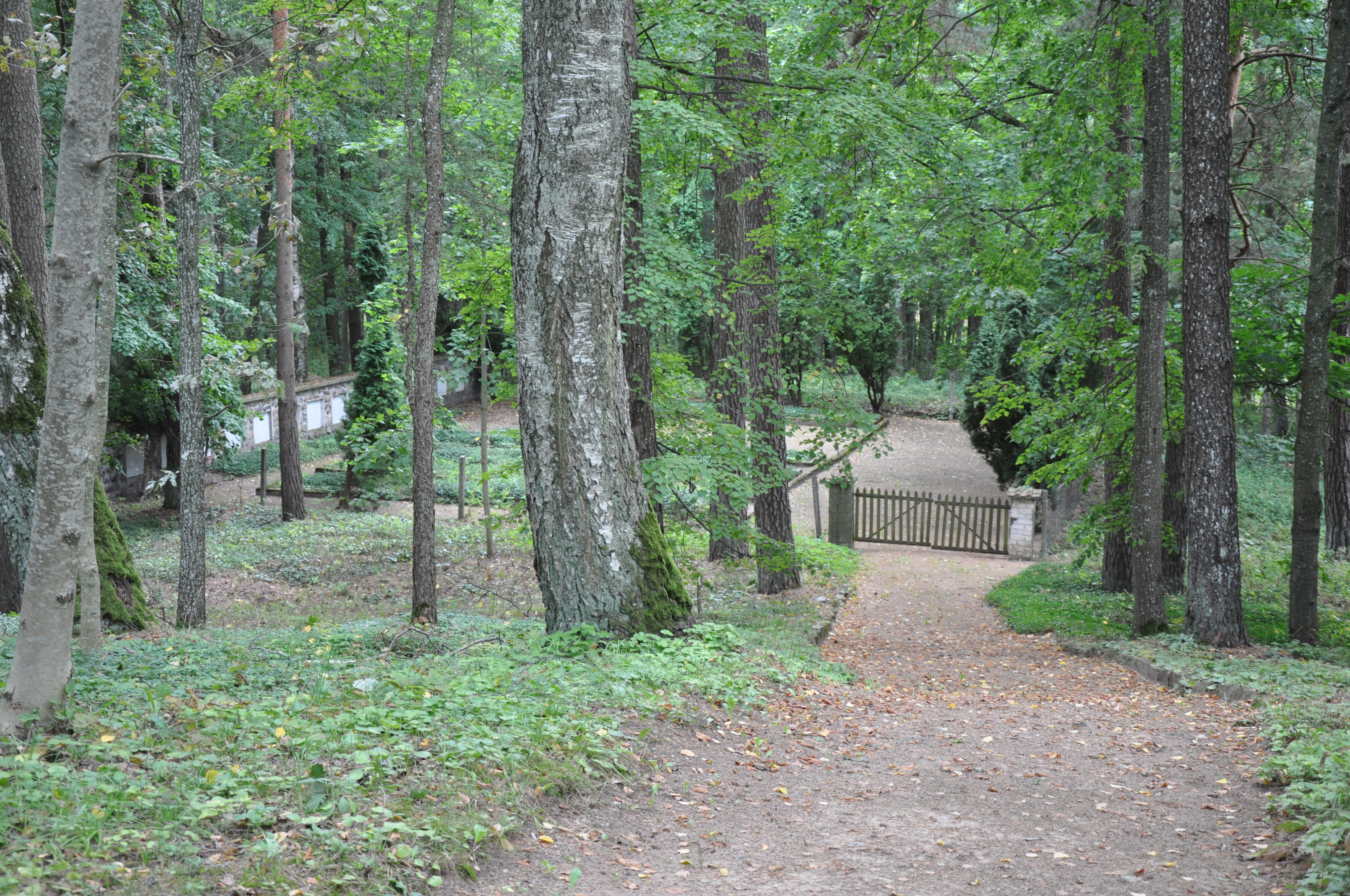 Sarkanās armijas brāļu kapi, WWII, Pūpju kapi, Lestenes pagasts, Tukuma novads, Latvia